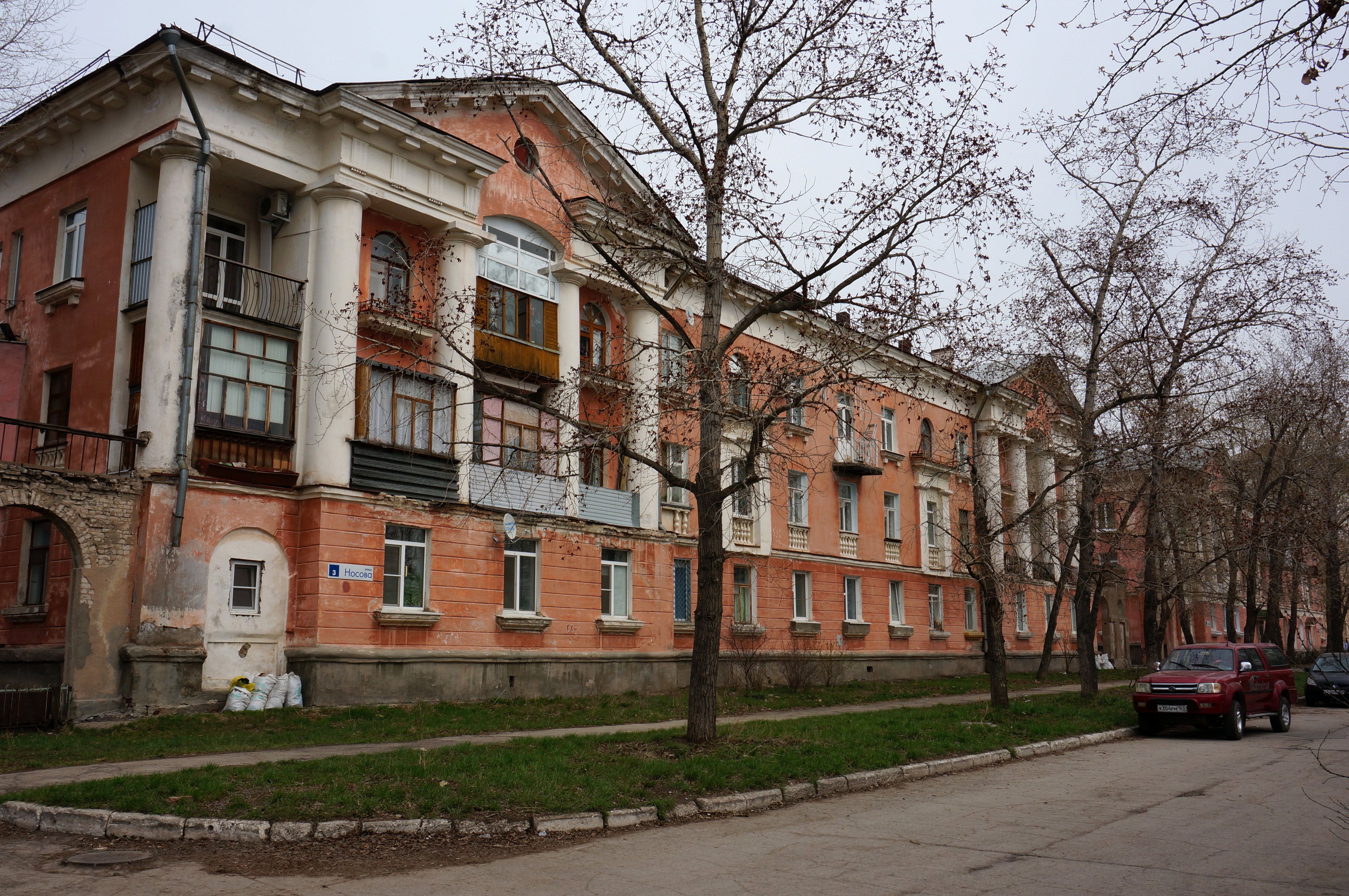 Россия, Тольятти, ул. Носова 3. Здание построено в 1957 году по проекту Ленгипрогора, разработанному архитектором И. Г. Роммом. Заказчиком являлся судоремзавод. Типичный представитель советского классицизма.